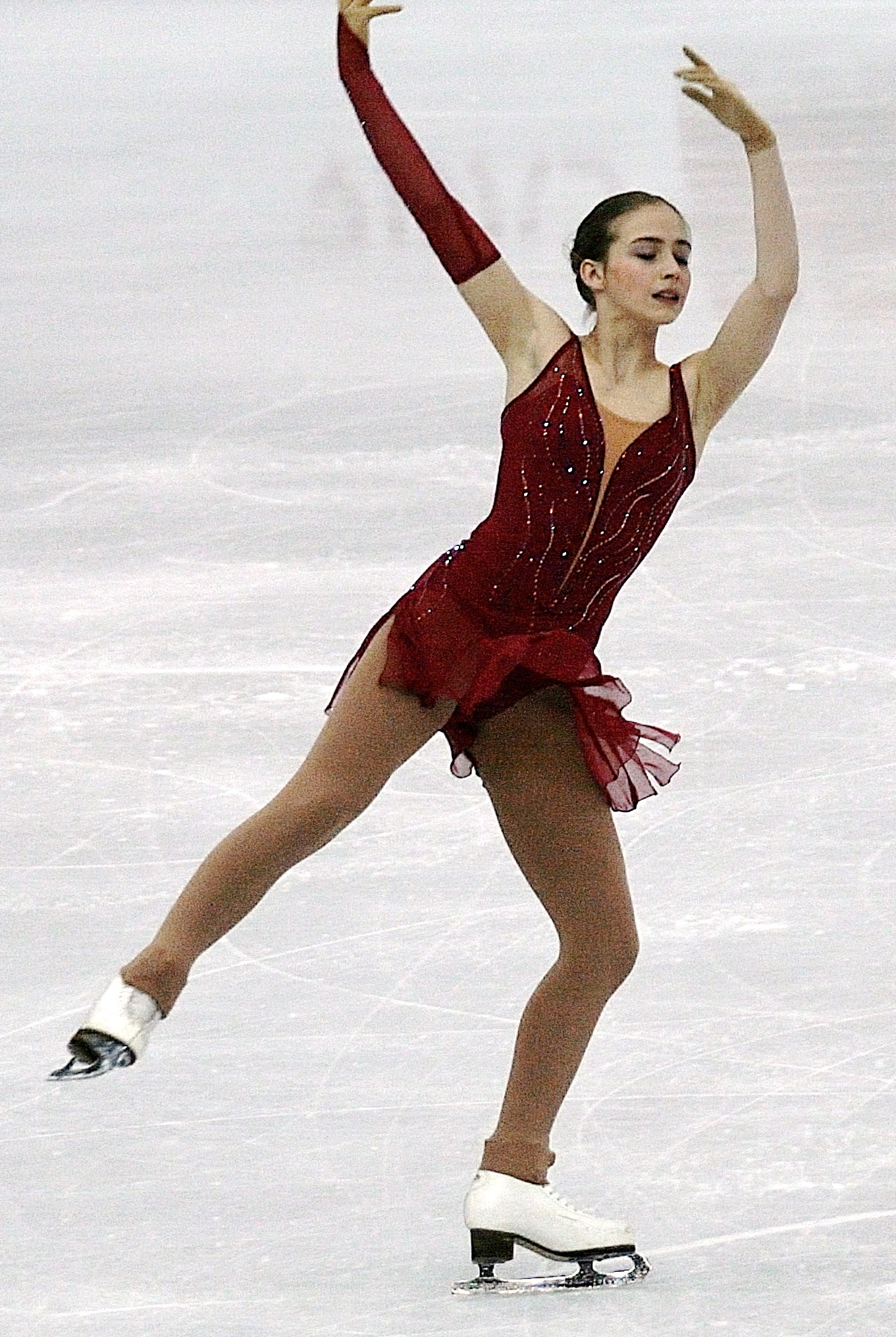 Инга Янулевичюте (Литва) на чемпионате мира по фигурному катанию 2012.